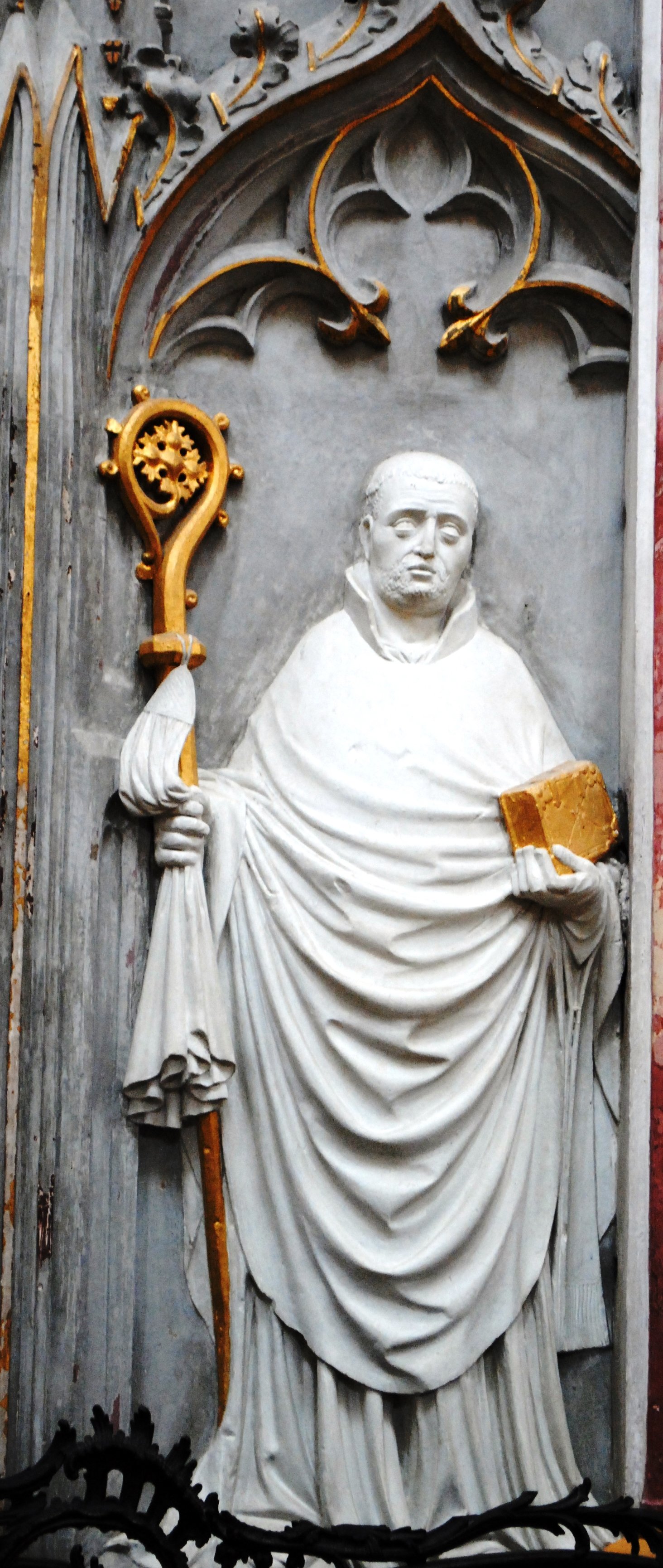 Epitaph des Heinrich III. Abt von Kloster Ebrach, Amtszeit 1404-1426